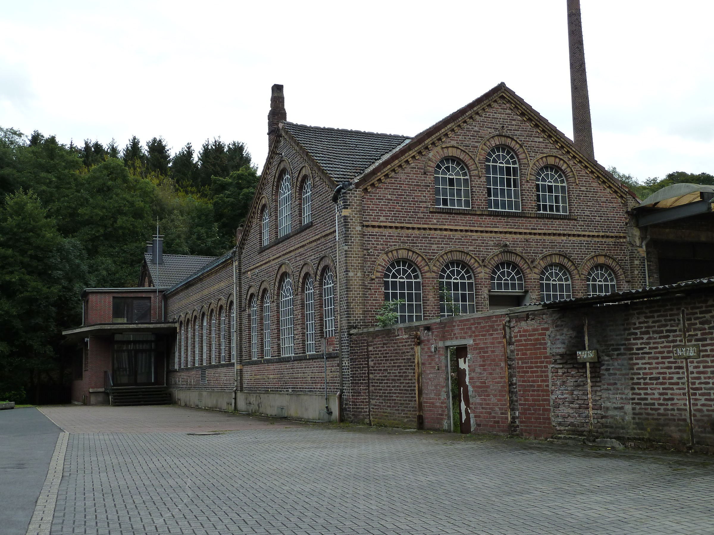 Fabrikgebäude der Firma Brackelsberg in EnnepetalThis is a photograph of an architectural monument., no. 0